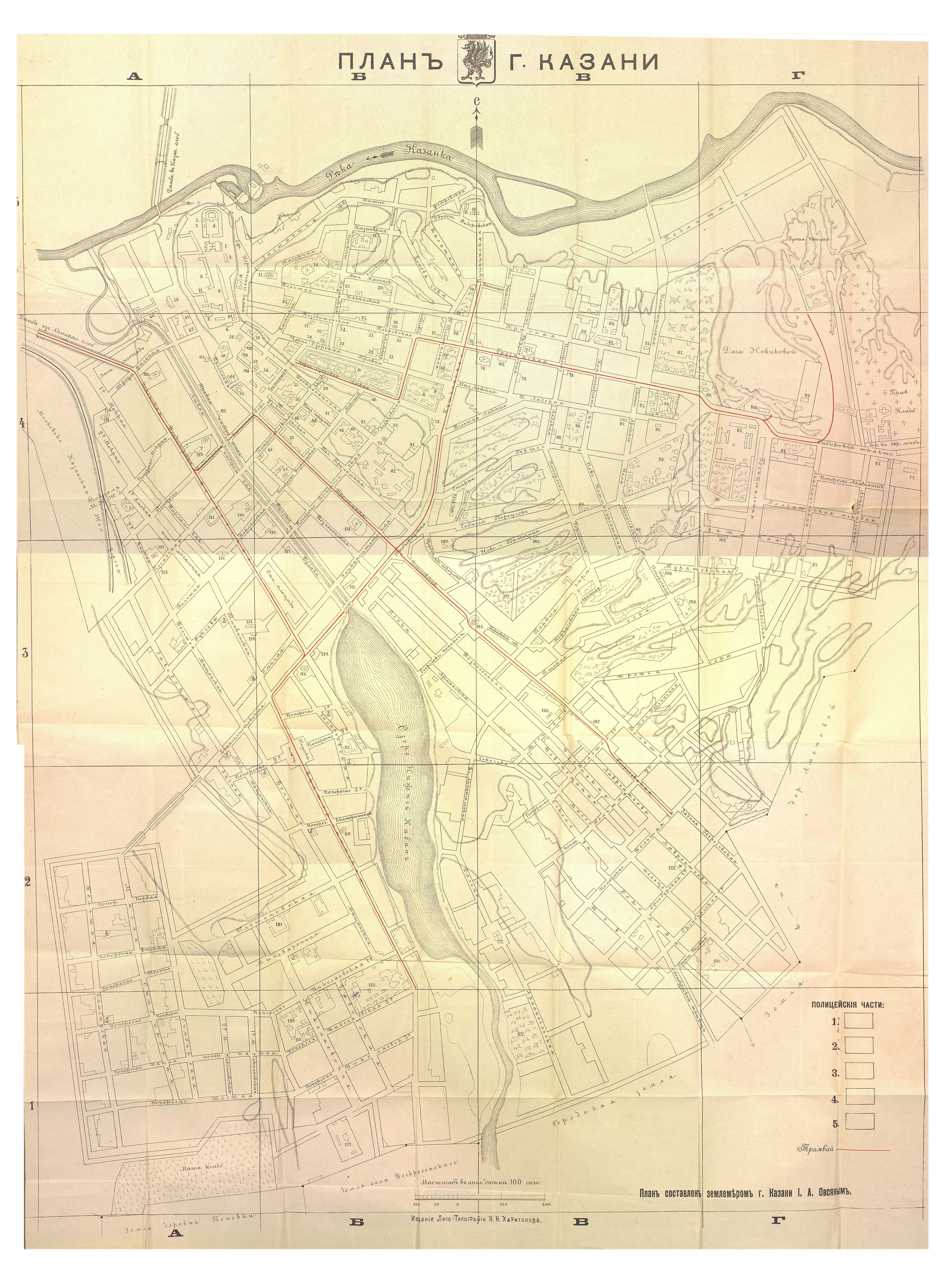 План г. Казани, составленный землемером И. А. Овсяным. Приложение к книге "Вся Казань. Адресная и справочная книга с приложением плана города. Под редакцией Н. Г. Шебуева" - Казань: Лито-Тип. И. Н. Харитонова, 1899.